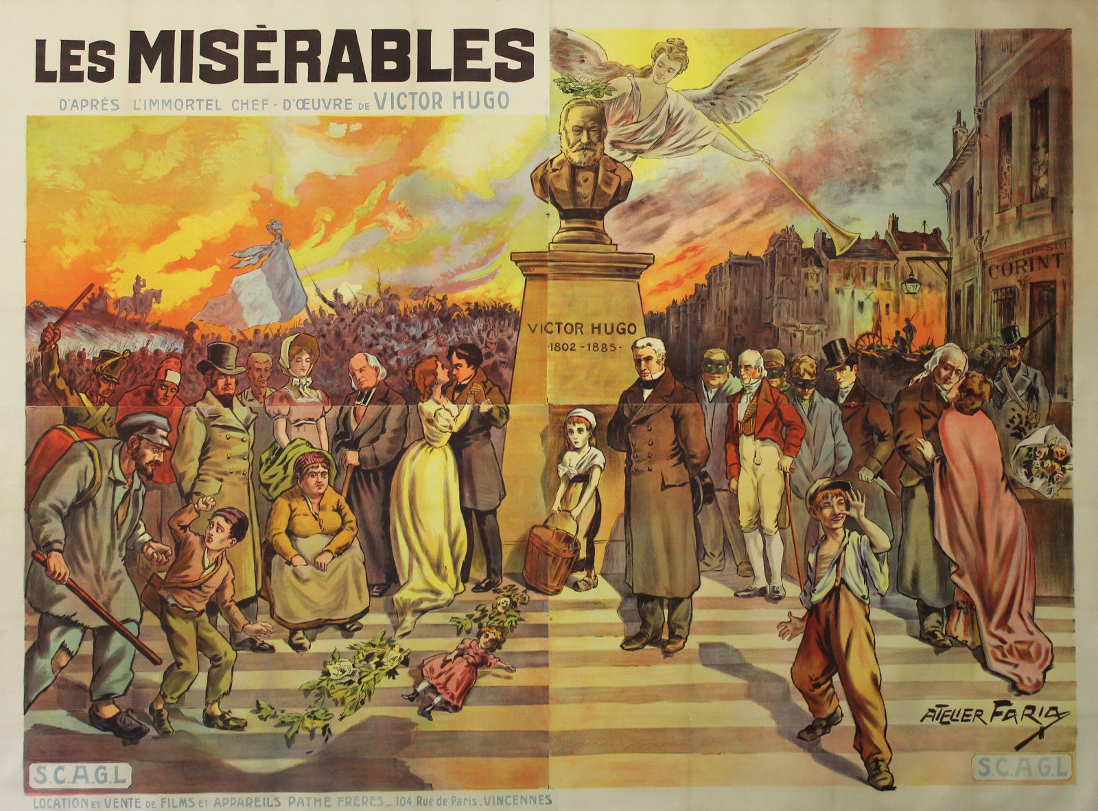 Affiche du film d'Albert Capellani, Les Misérables (1912).